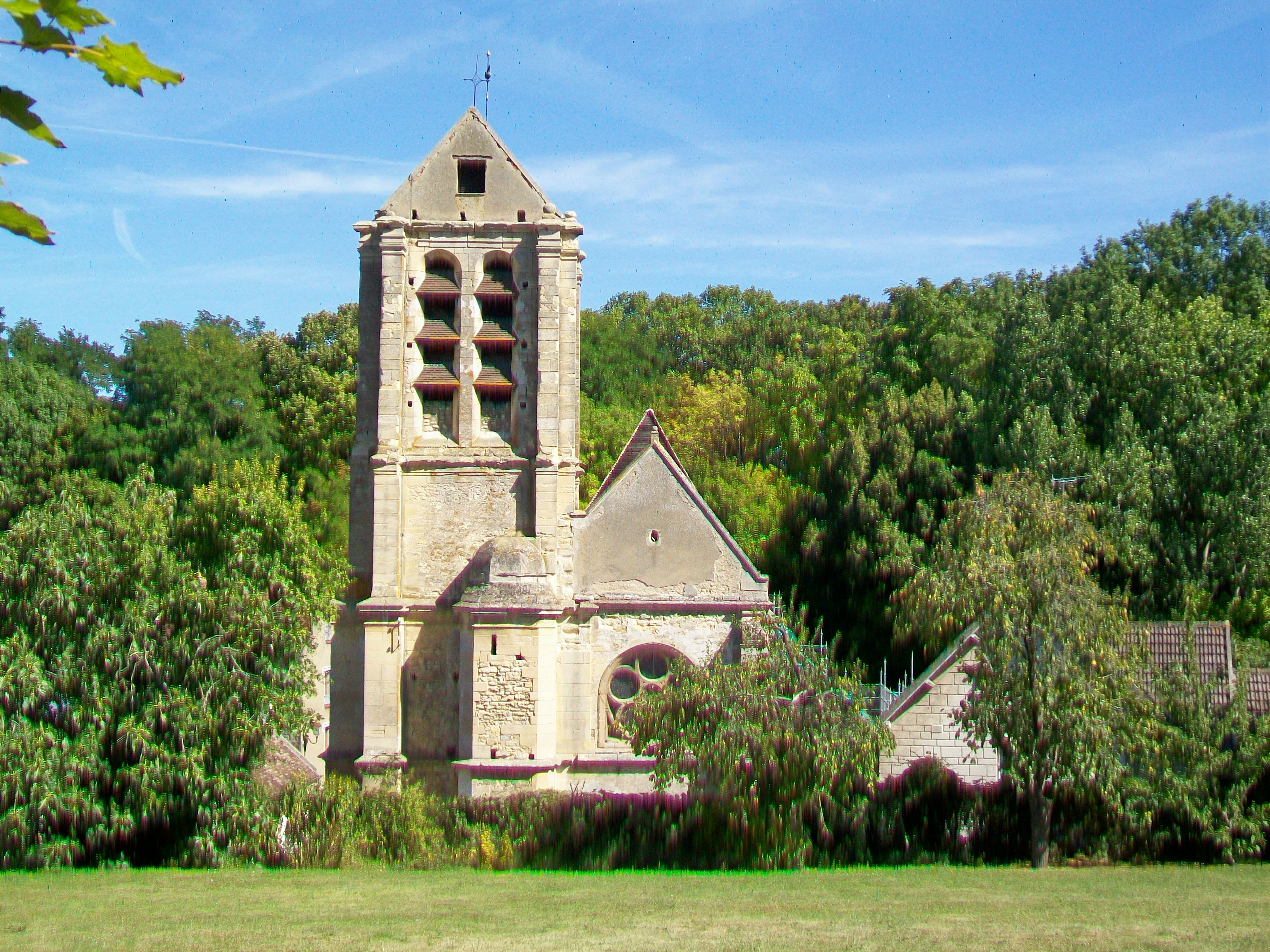 Église Notre-Dame-de-l'Assomption, rue Nationale / rue de l'Église ; façade sud, vue depuis la rue Amédée-de-Caix-de-Saint-Aymour.